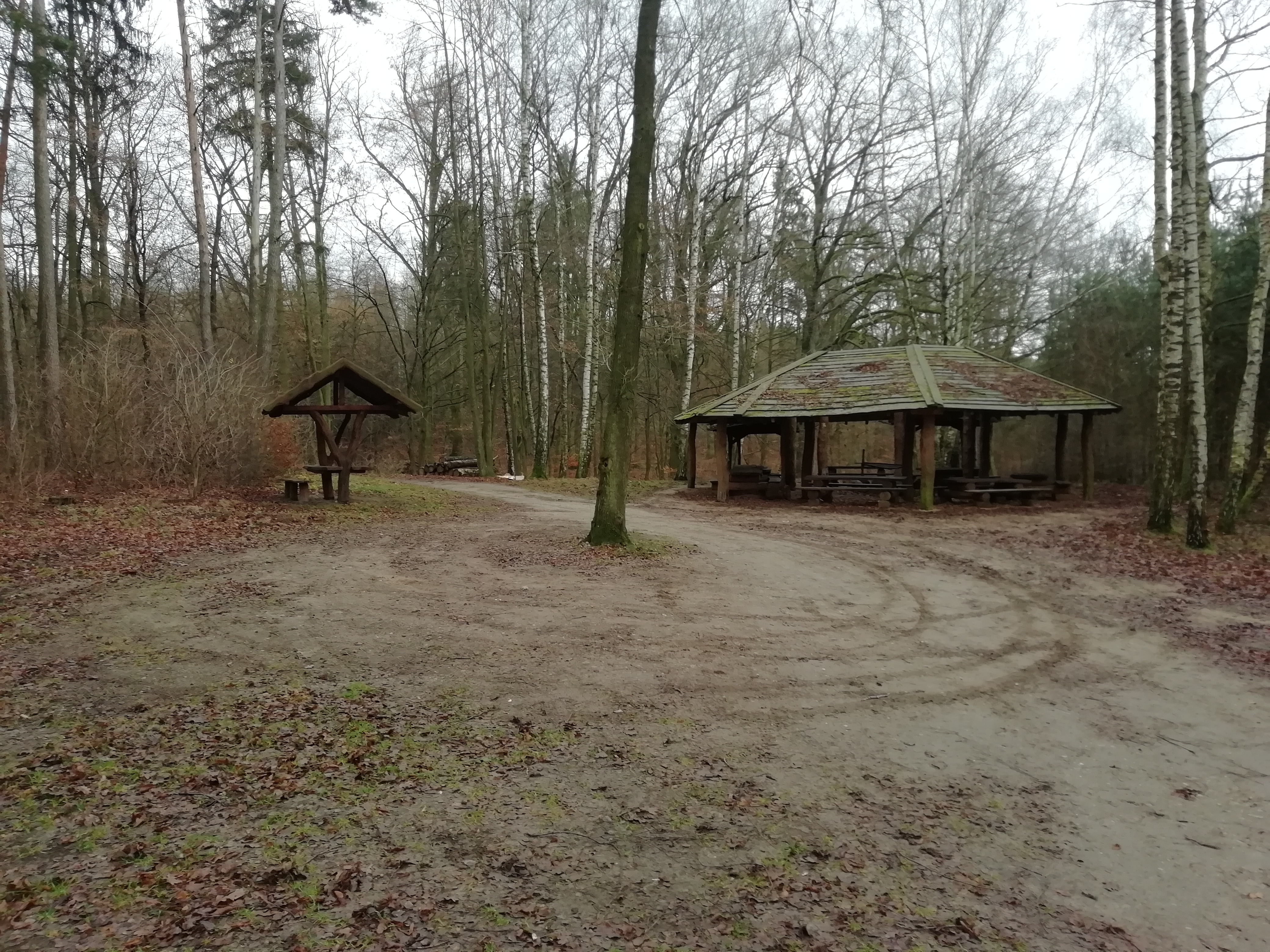 Miejsce wypoczynku w lesie w Tulicach